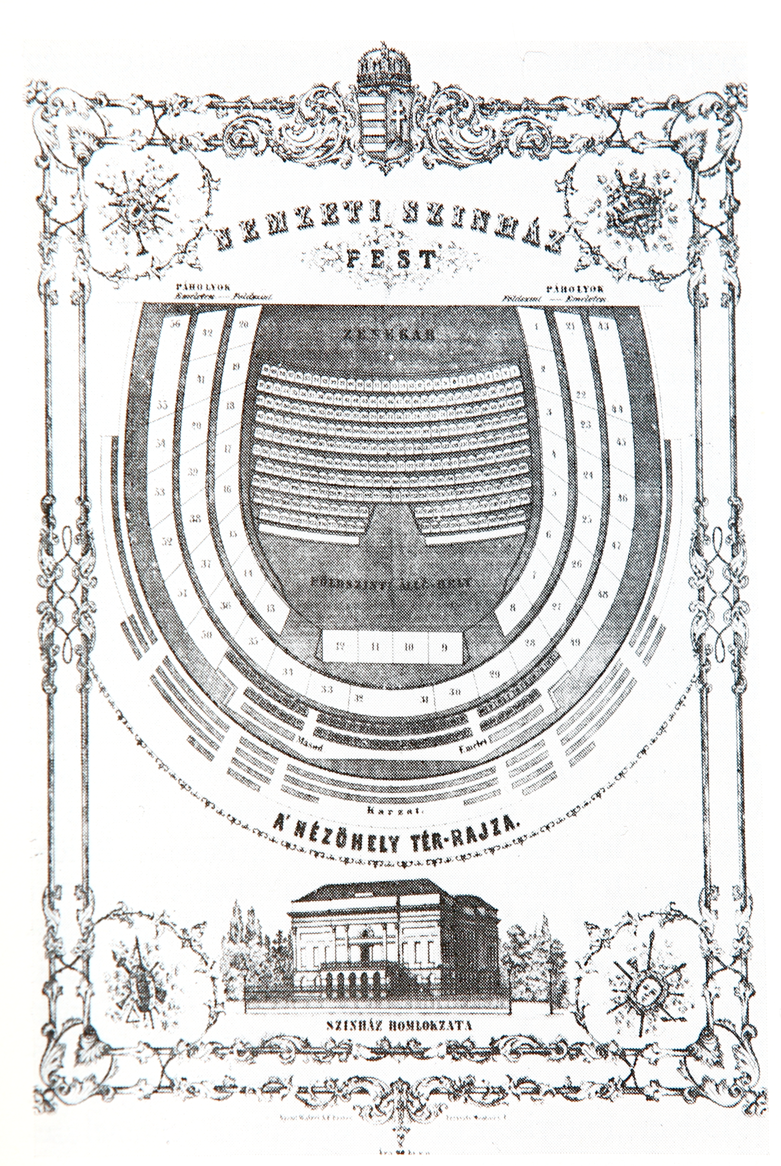 A "Nemzeti szinház Pest" című nézőtéri helyszínrajz és illusztrációjaként a színház homlokzata és oldala északnyugat felől (Kőmetszet, 10,2 x 15,9 cm; Tervezte: Montini L. F., 1840-es évek. Nyomda: Walzel A. F. eredeti fellelhető a BTM Fővárosi Képtárban.) - ennek 1970-beni kis méretű reprodukciója a Budapest Enciklopédiában.